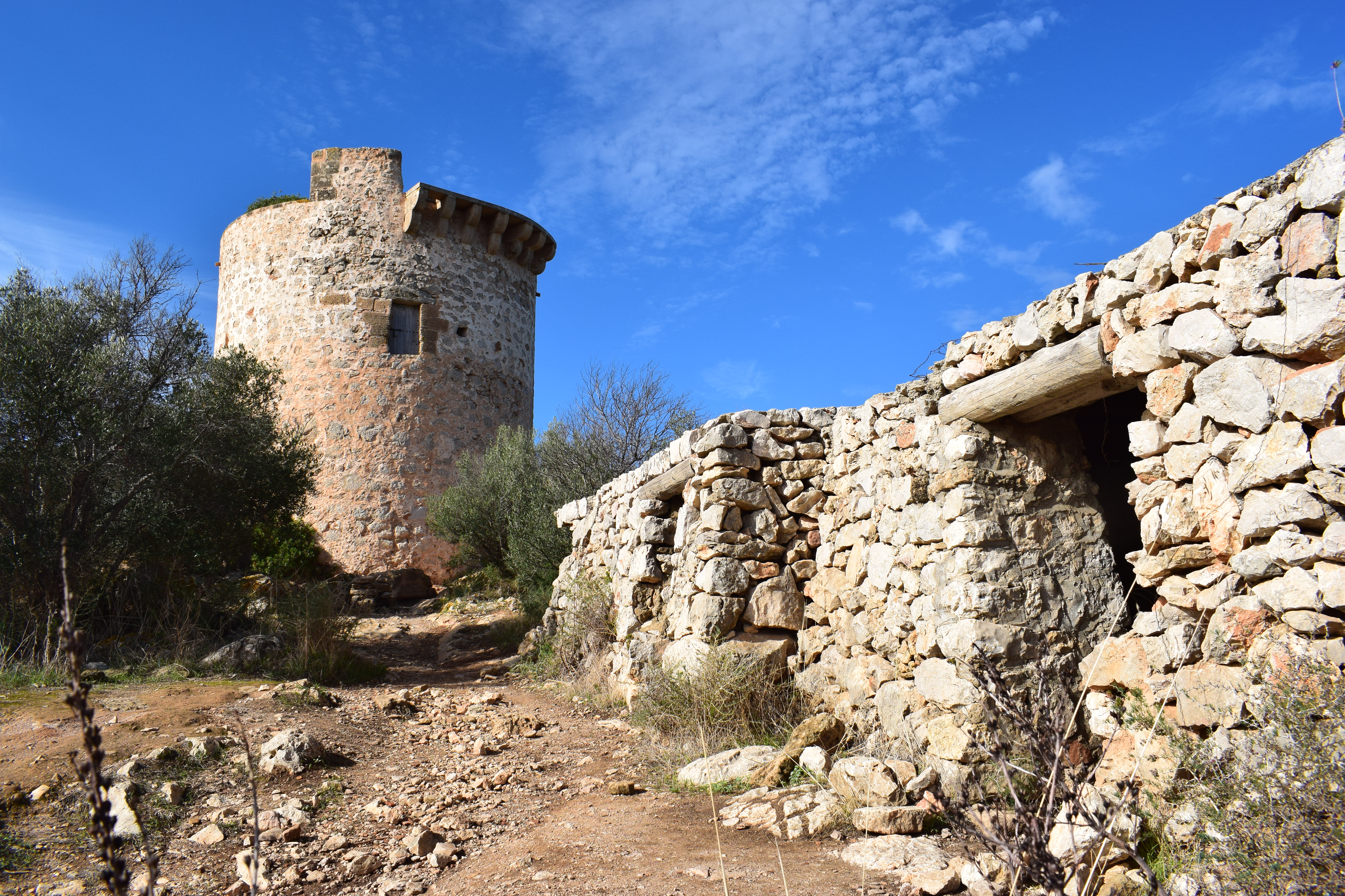 Der Küstenwachturm Torre de Cap Andritxol bei Camp de Mar, Mallorca.